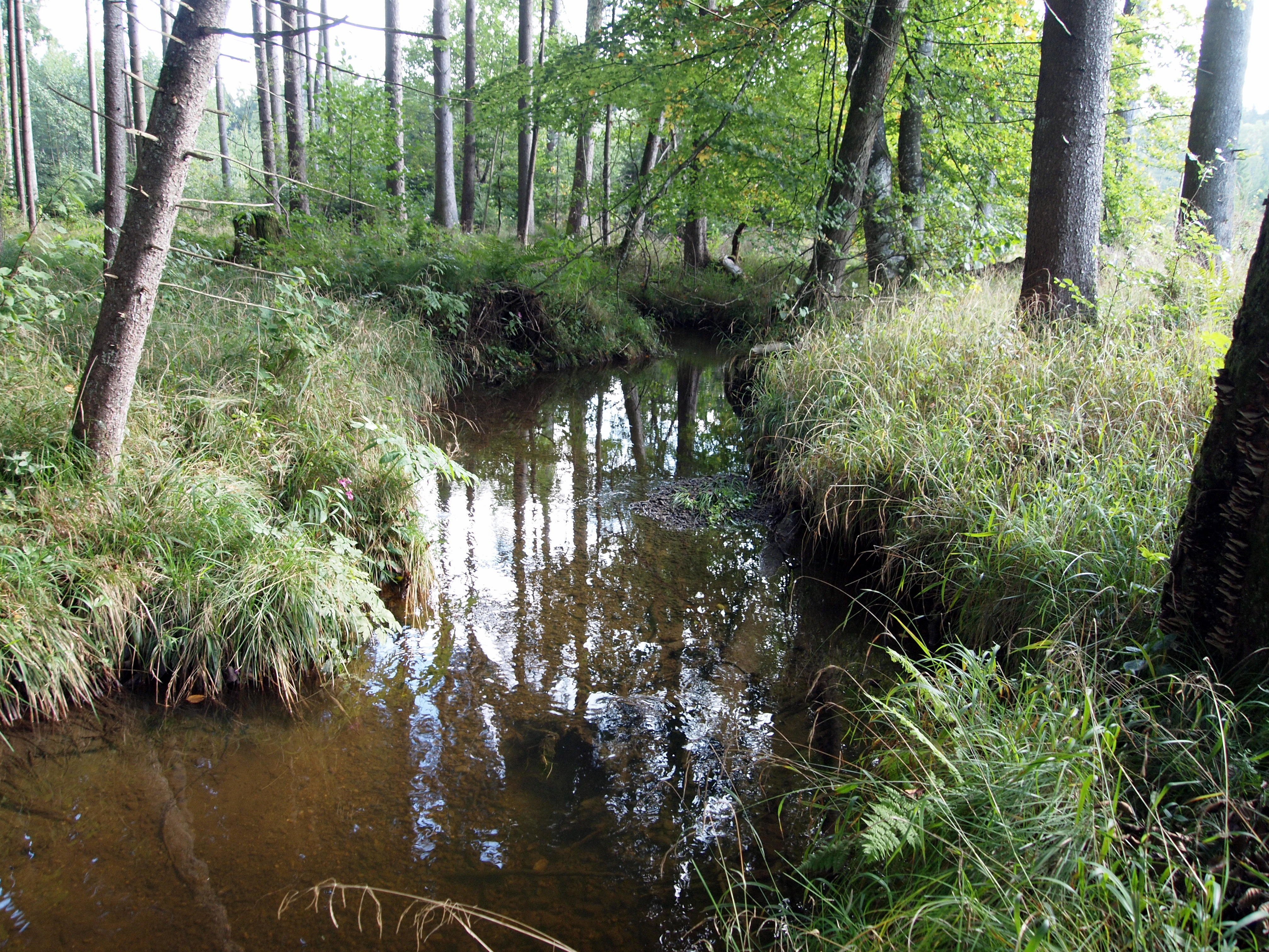 Unterer Schwarzenbach im Hörtwald am Dreiländerstein bei Binkenhofen